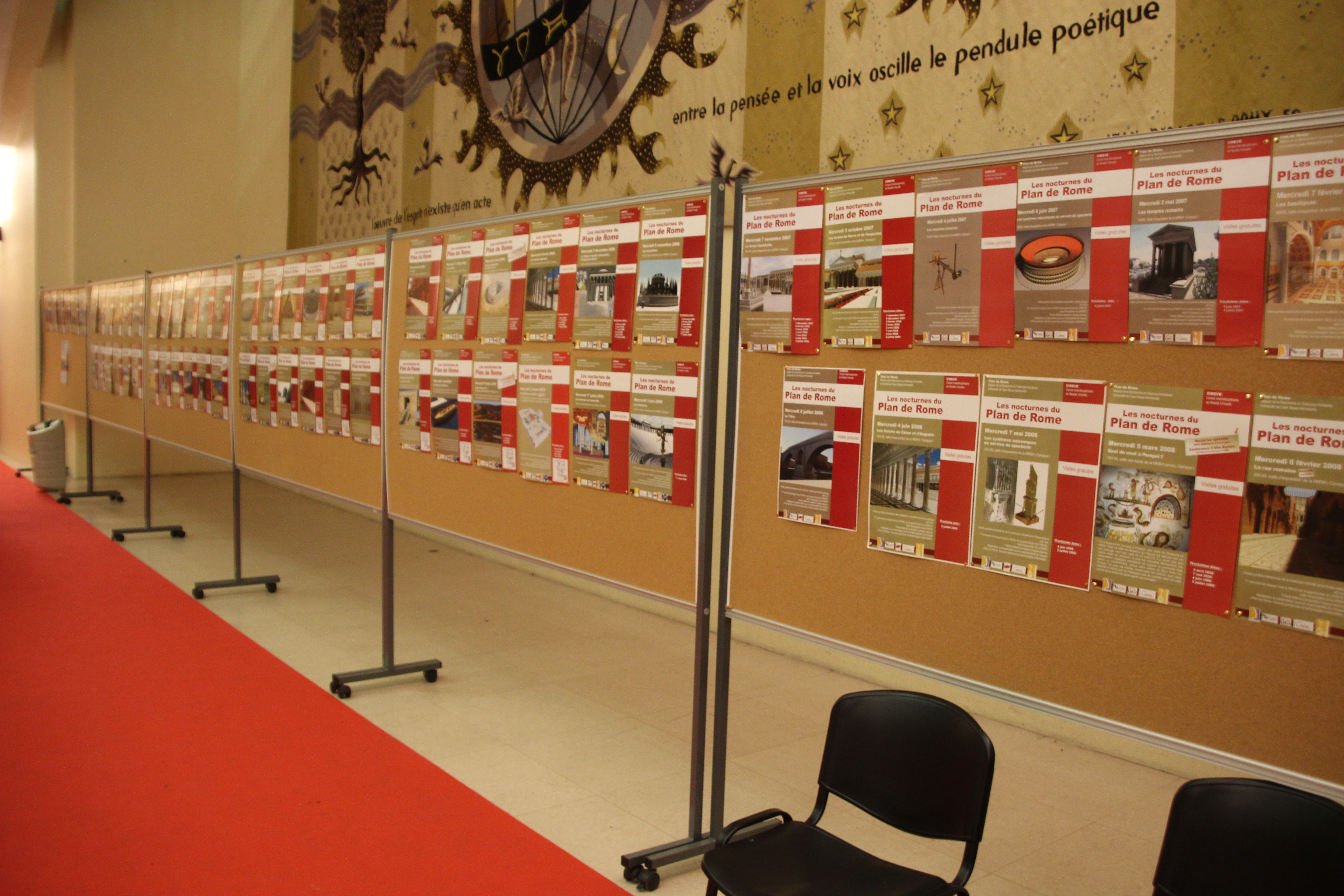 10 ans de Nocturnes du Plan de Rome 2016